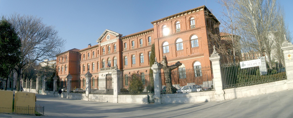 Panorámica del IES José Zorrilla de Valladolid en la Plaza San Pablo, el más antiguo de la ciudad (1857). El edificio se inauguró en 1907. Para saber más: El nuevo Instituto General y Técnico de Valladolid / Policarpo Mingote y Tarazona. – Valladolid : Ayuntamiento, 2007. – 21,5 cm : fot. ; 87 p. – Ed. facs. de la ed. de: Valladolid : Imprenta Castellana, 1908. – Ed. no venal